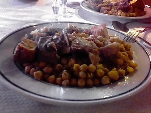 Cocido Lebaniego